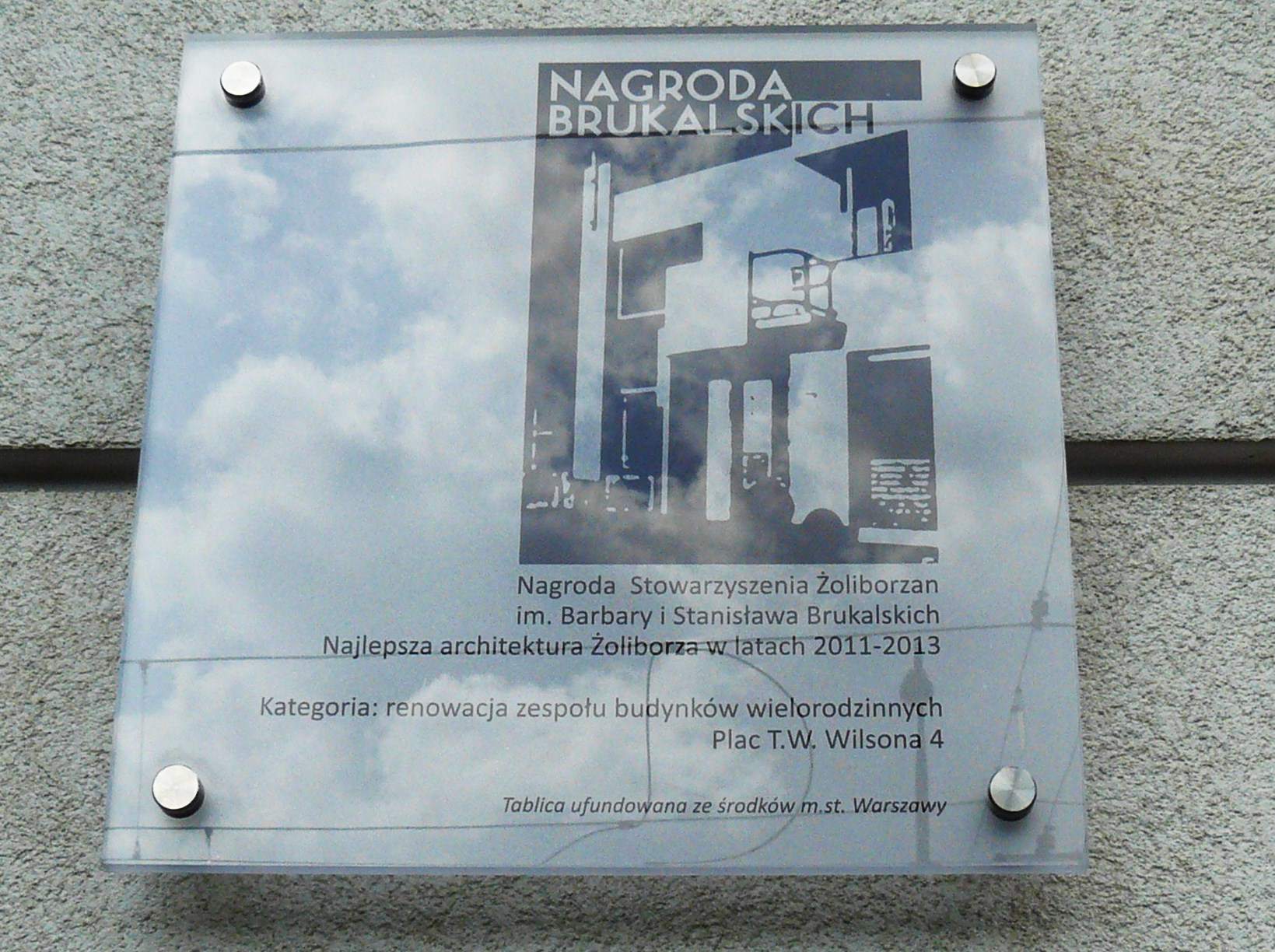 Tablica Nagrody Brukalskich w Warszawie.